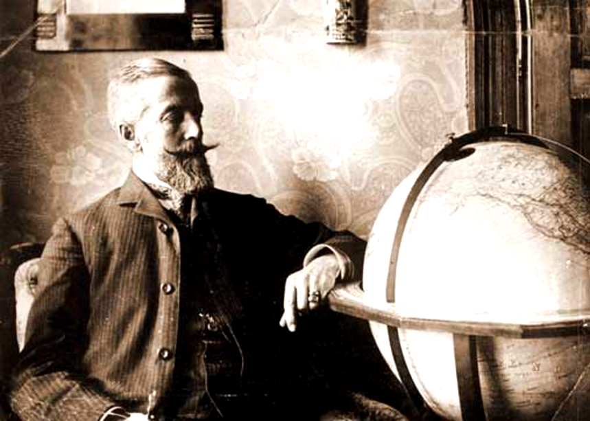 Kogutowicz Manó azáltala szerkesztett földgömbjével